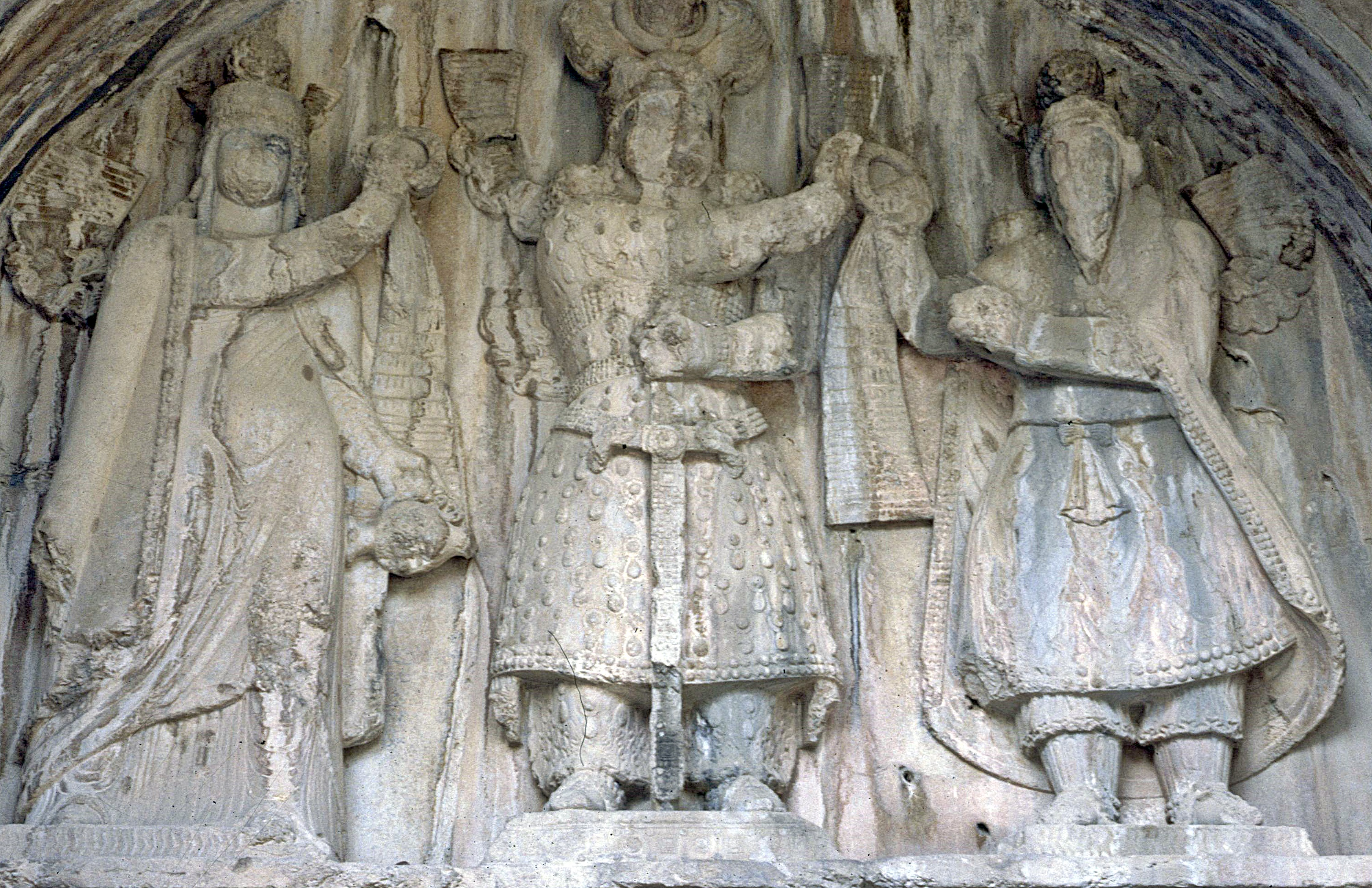 Taq-i-Bustan: Krönung von Khosrow